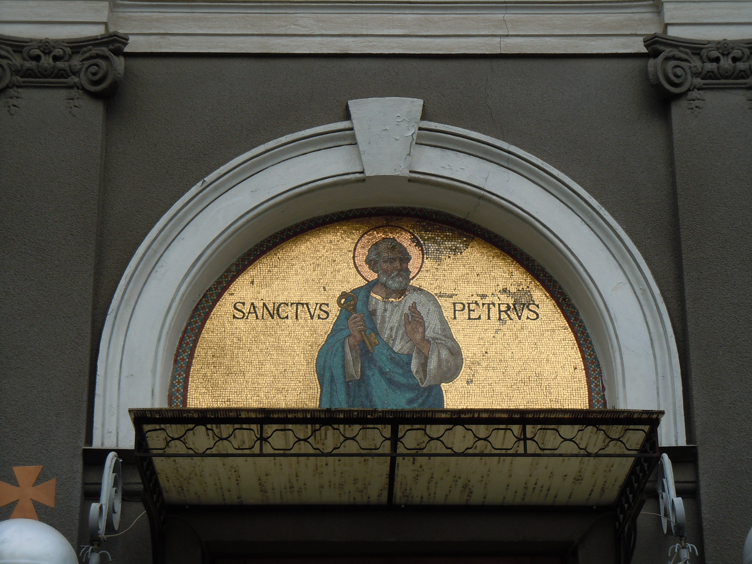 Костьол св. Петра, Одеса, Гаванна вул., 5